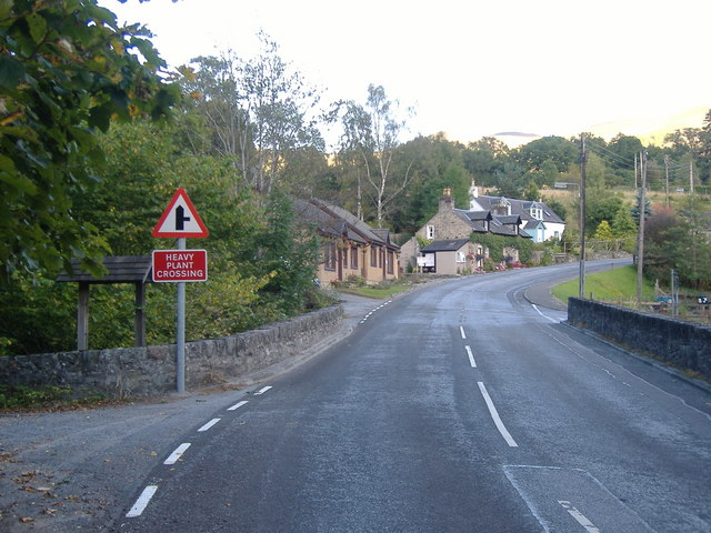 Killiecrankie